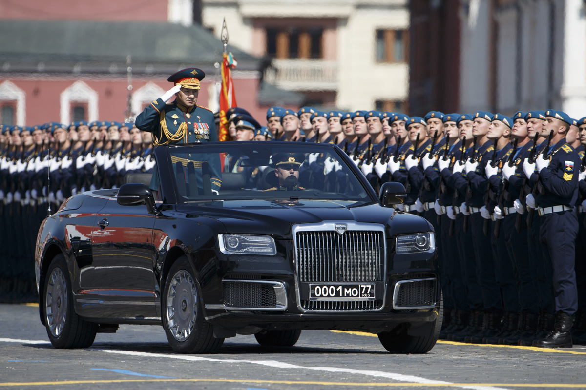 Парад Победы в Москве, посвященный 75-й годовщине Победы в Великой Отечественной войне